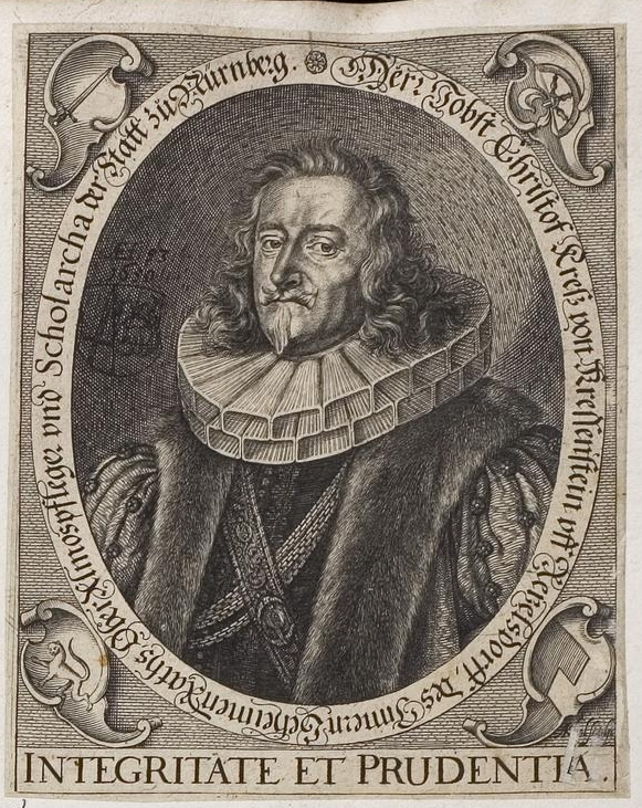 Grafik aus dem Klebeband Nr. 3 der Fürstlich Waldeckschen Hofbibliothek Arolsen Motiv: Jobst Christoph Kress von Kressenstein (1597–1663), Respondent an der Univ. Jena: Nürnberger Ratsherr; Diplomat auf dem westfälischen Friedenskongreß; Septemvir; Vertreter Nürnbergs bei Gustav Adolf